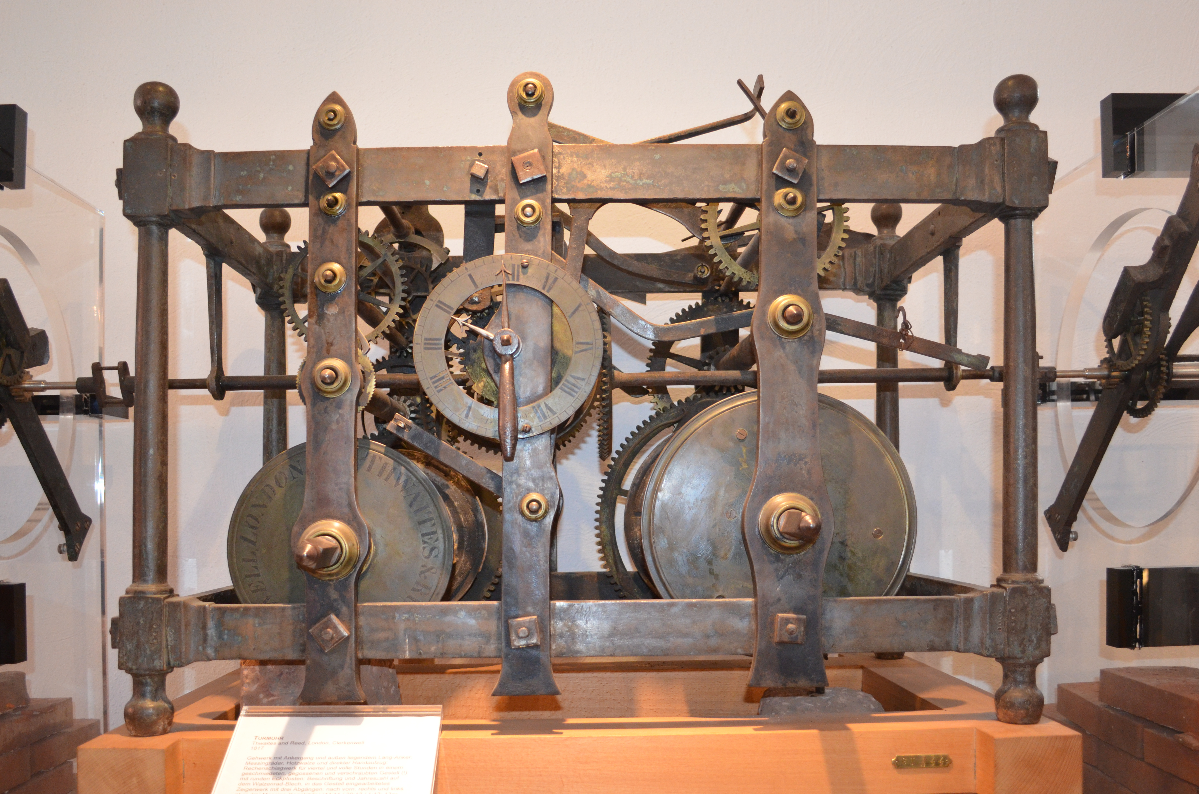 Hessenpark, Haus aus Laubach, Uhr Thwaites & Reed 1817, die Genehmigung zur Veröffentlichung des Bildes wurde durch das Aufsichtspersonal erteilt